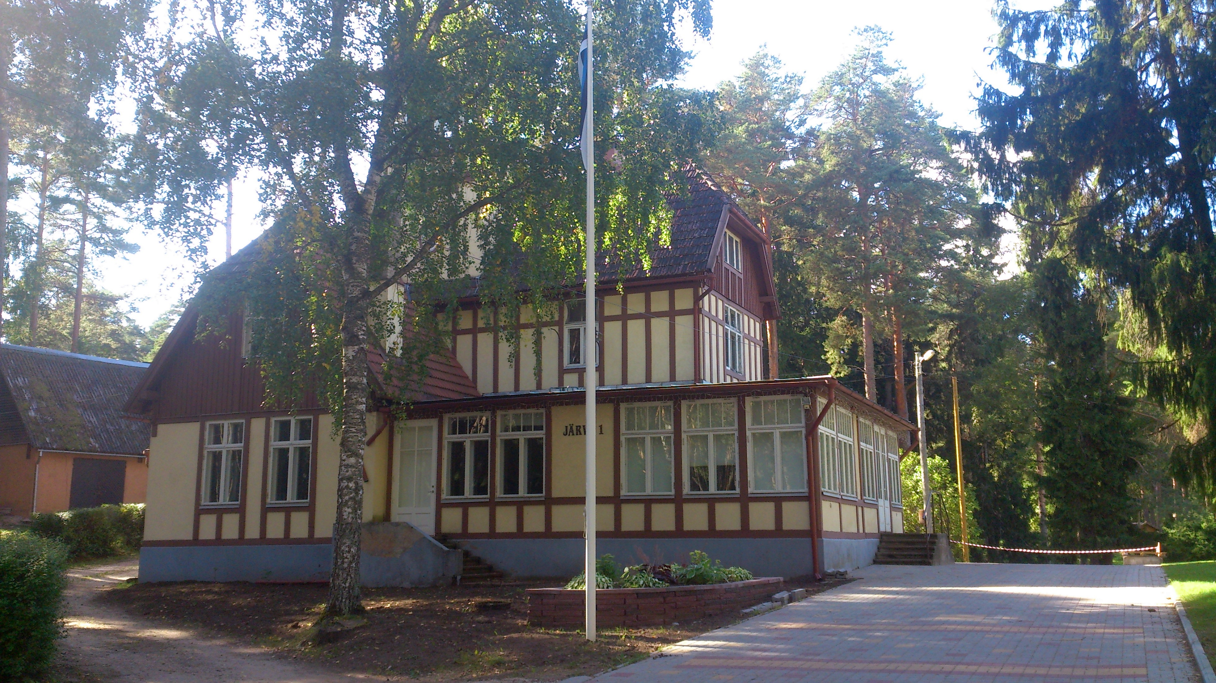 Endine Afanasjevi suvila Elvas Järve tänav 1, 31. august 2013. Ehitatud 1905-1908.